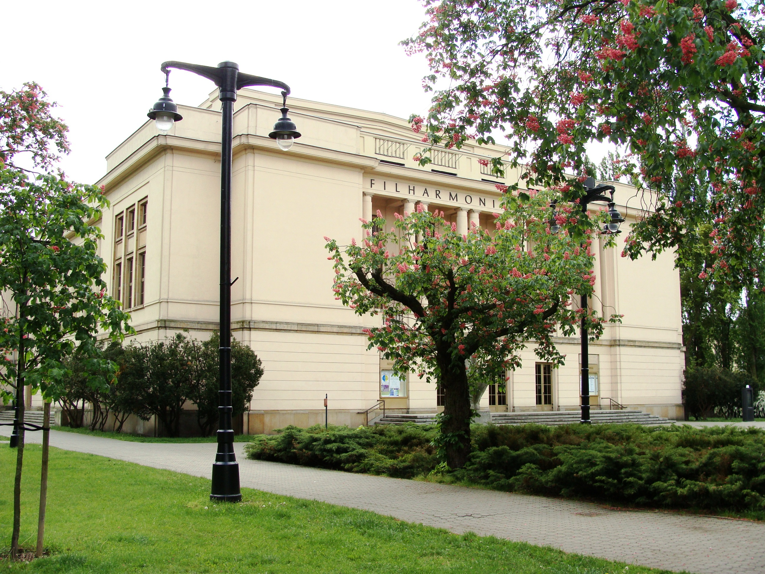 Bydgoszcz, Filharmonia Pomorska, 1954-1958